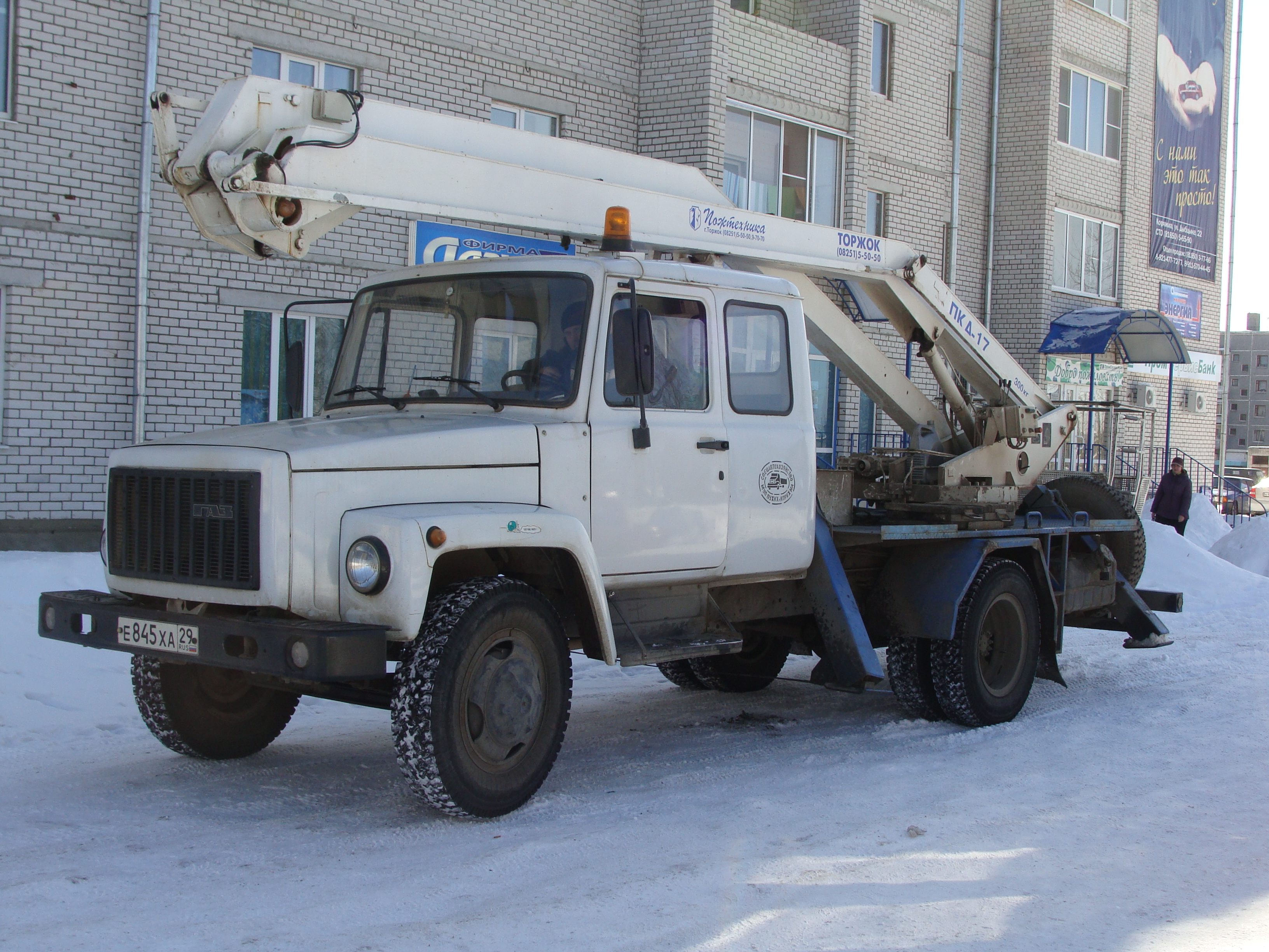 Автогидроподъемник ПКА-17 на шасси ГАЗ